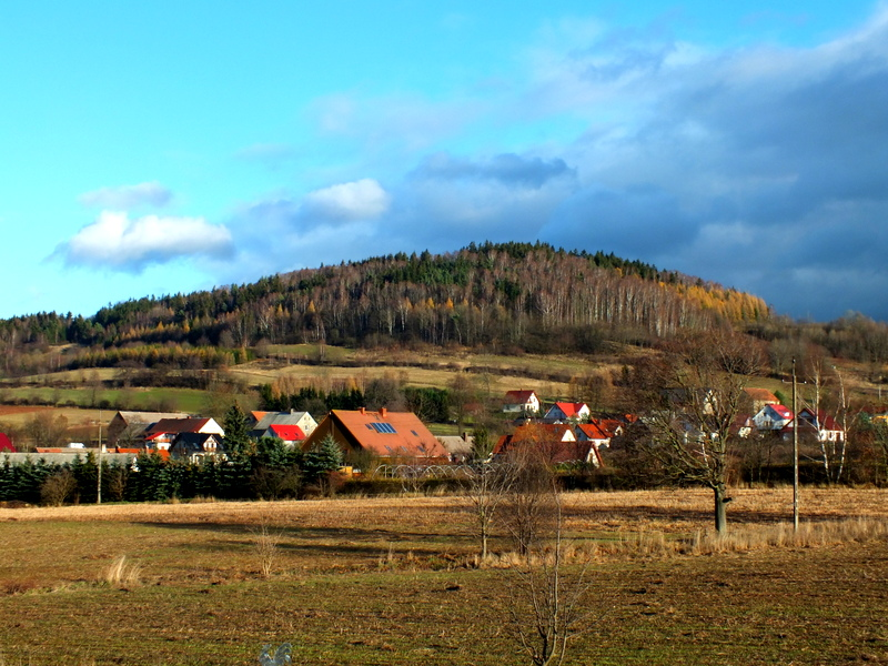 Długosz w Górach Kruczych (zachodnia część Gór Kamiennych Sudetów Środkowych)